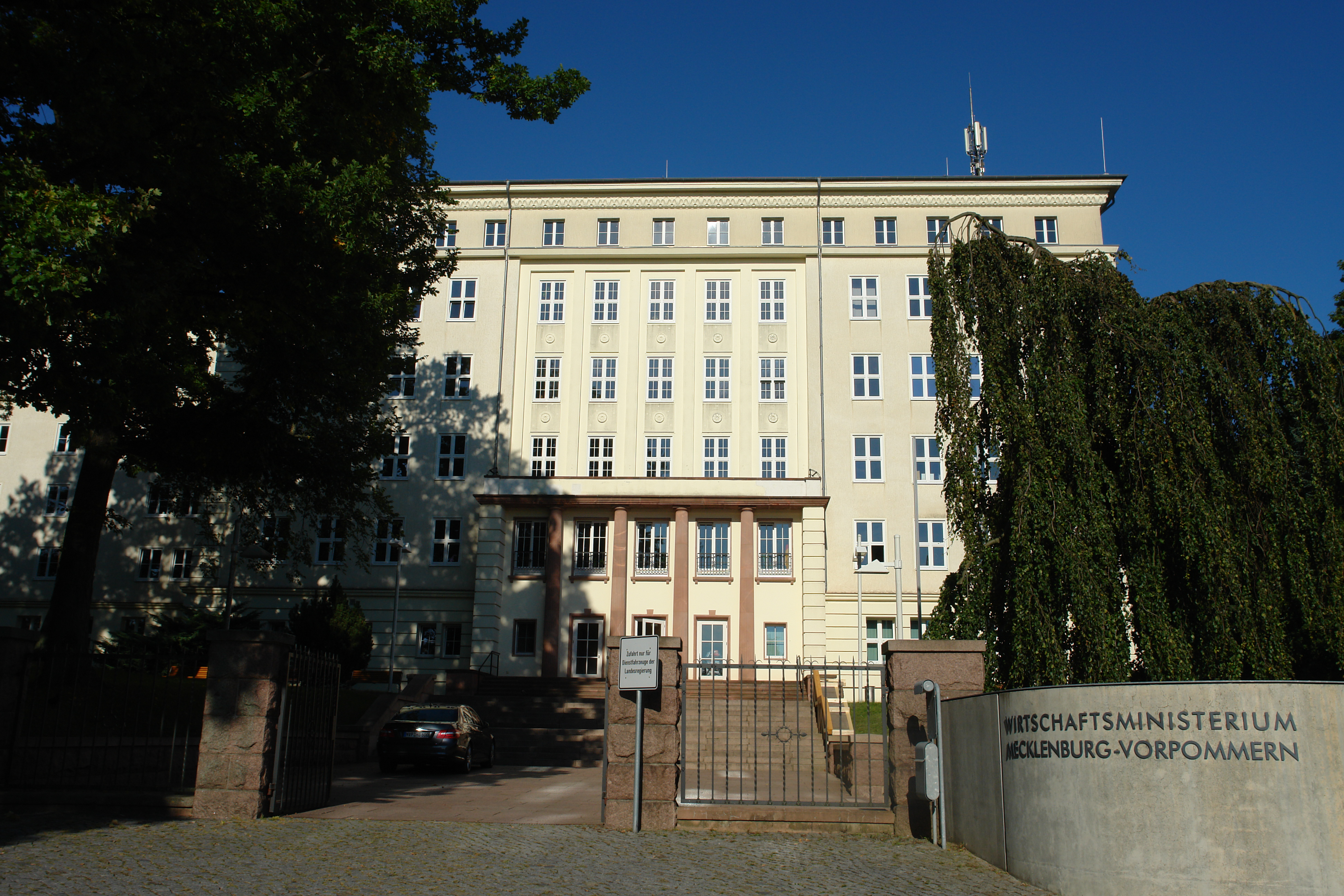 Gebäude Johannes-Stelling-Str. 14, Schwerin. Ehemalige Parteischule, heute Wirtschaftsministerium des Landes Mecklenburg-Vorpommern. Zu sehen ist der Haupteingang des Gebäudes, aufgenommen von einer Position vor der Toreinfahrt.